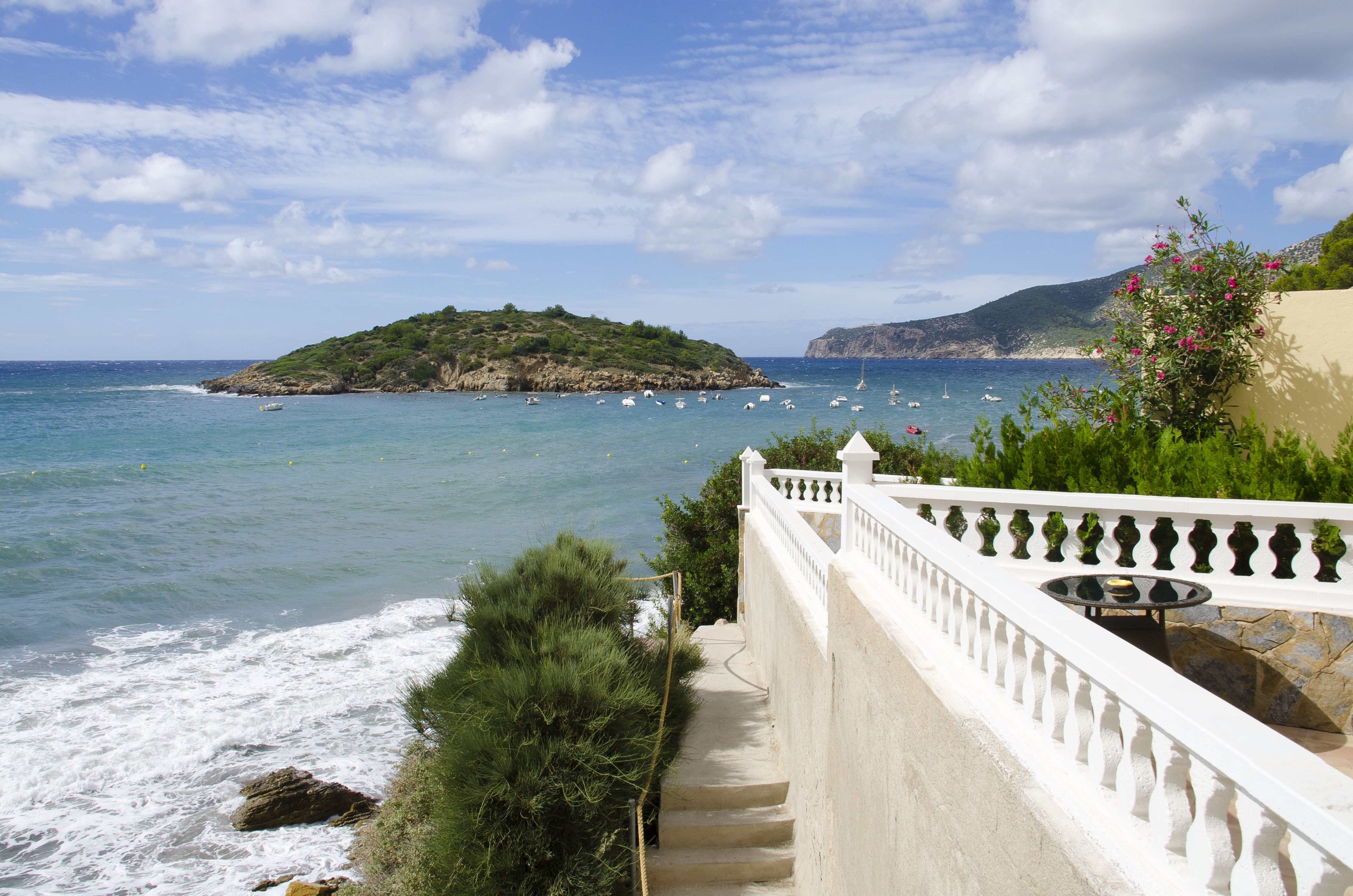 La Illa Pantaleu, Sant Elm, Mallorca